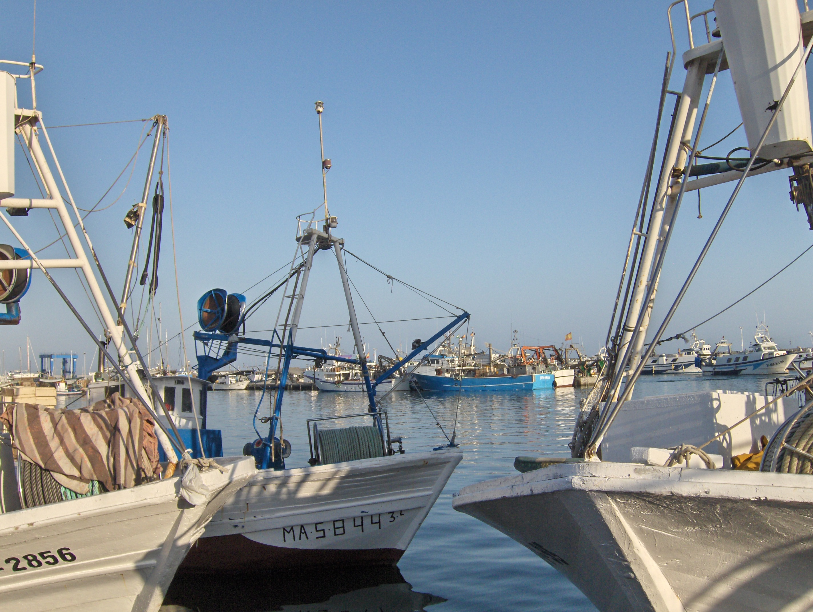 Puerto de La Caleta, Vélez-Málaga, España.